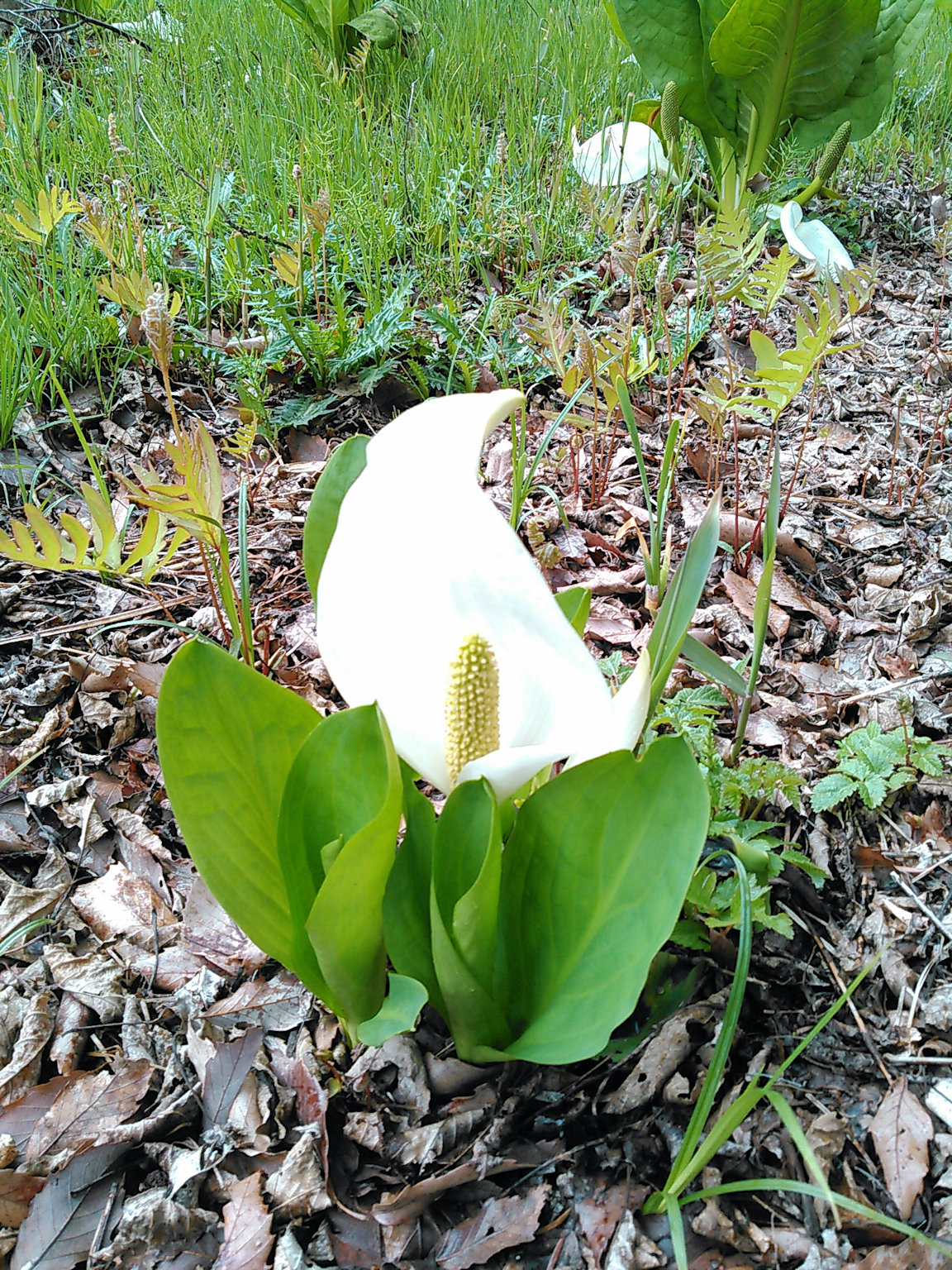 馬入新田水芭蕉群生地の水芭蕉